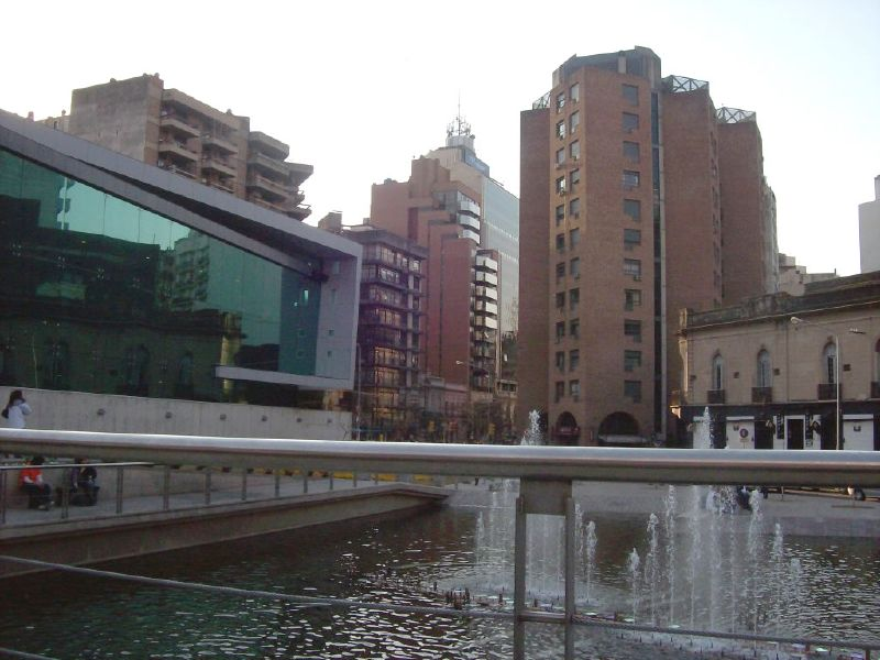 Paseo del Buen Pastor, Córdoba, Argentina